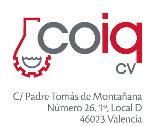 Logo del Colegio Oficial de Ingenieros Químicos de la Comunitat Valenciana